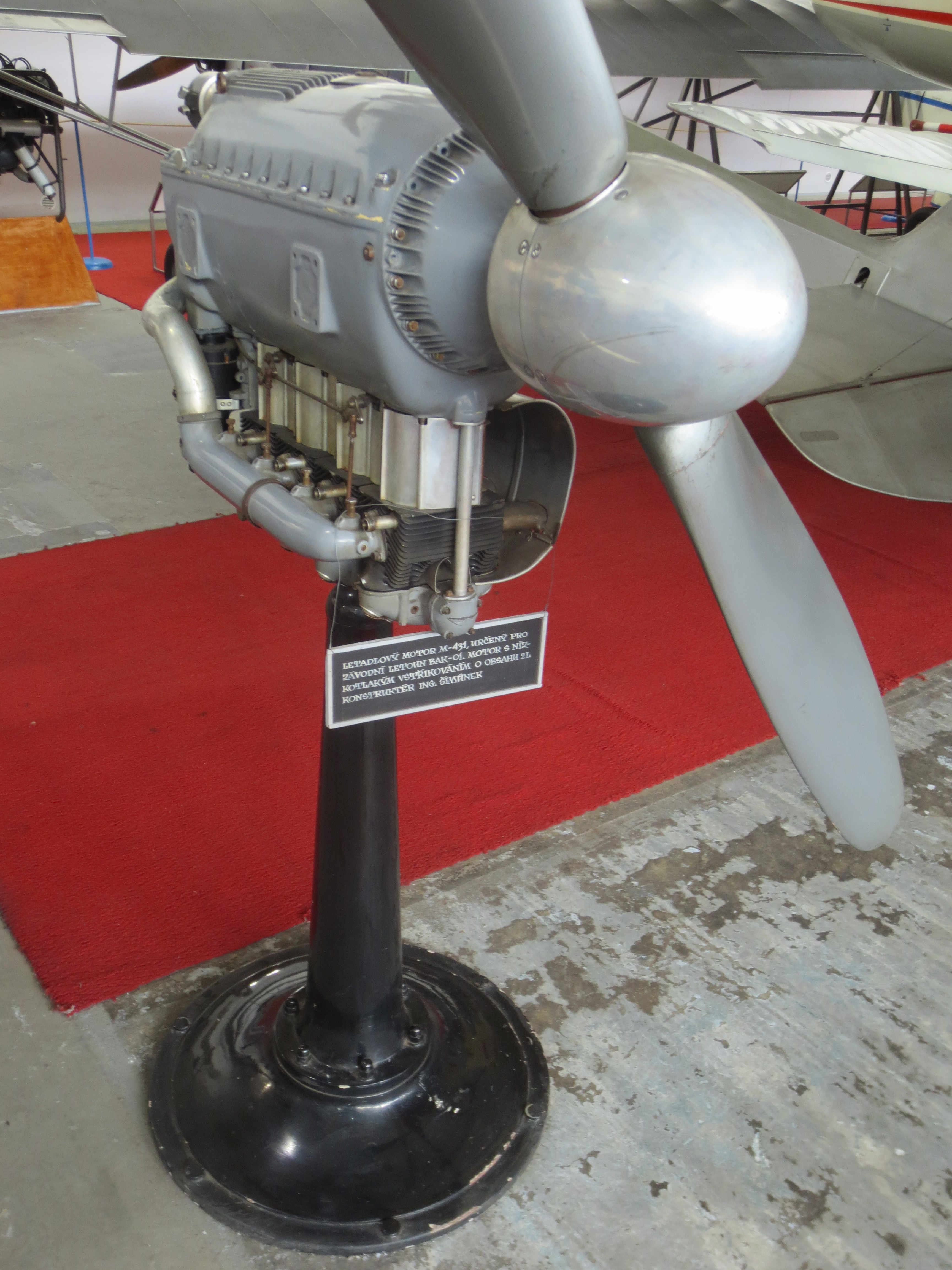 Walter M-431, invertní čtyřválcový řadový vzduchem chlazený letecký motor